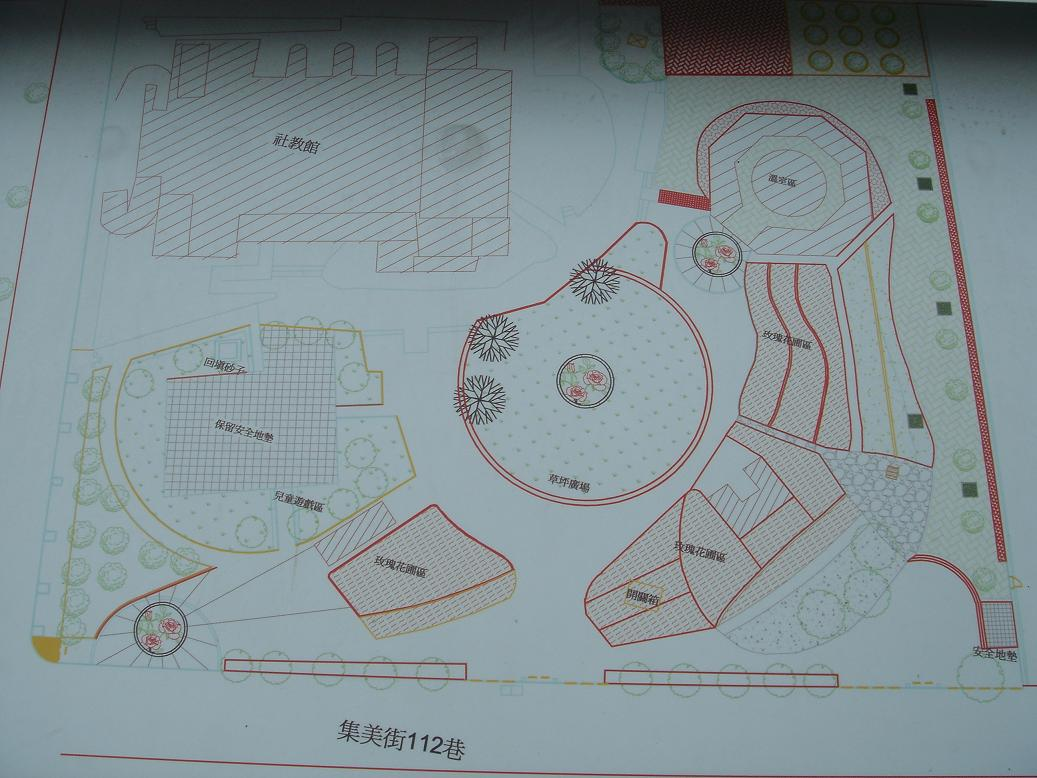 中文（台灣）: 玫瑰公園平面配置圖，地址：台北縣三重市集美街112號。